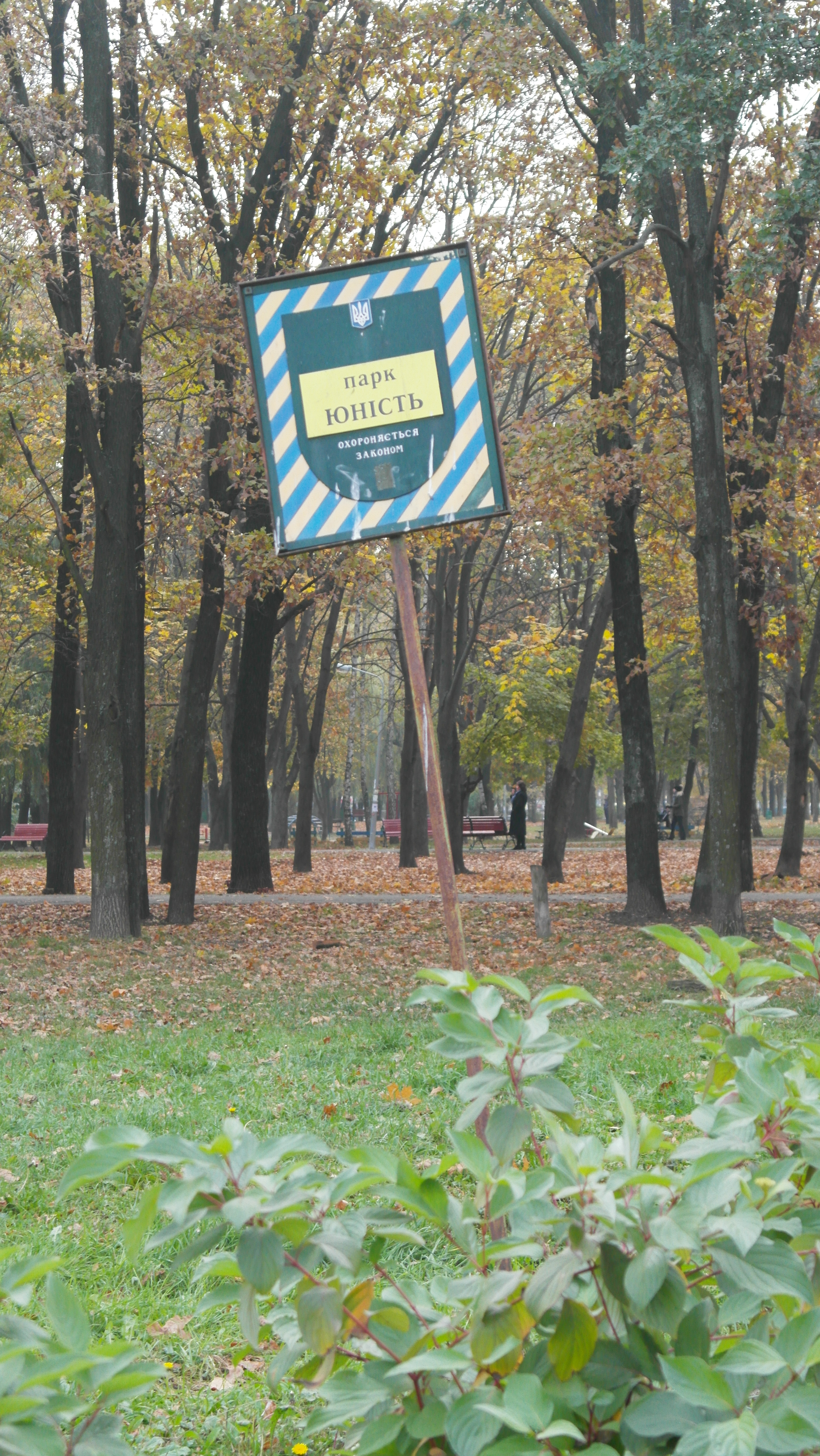 Парк «Юність»|, Святошинський район, перетин вул. Картвелішвілі та просп. Леся Курбаса у Святошинському районі